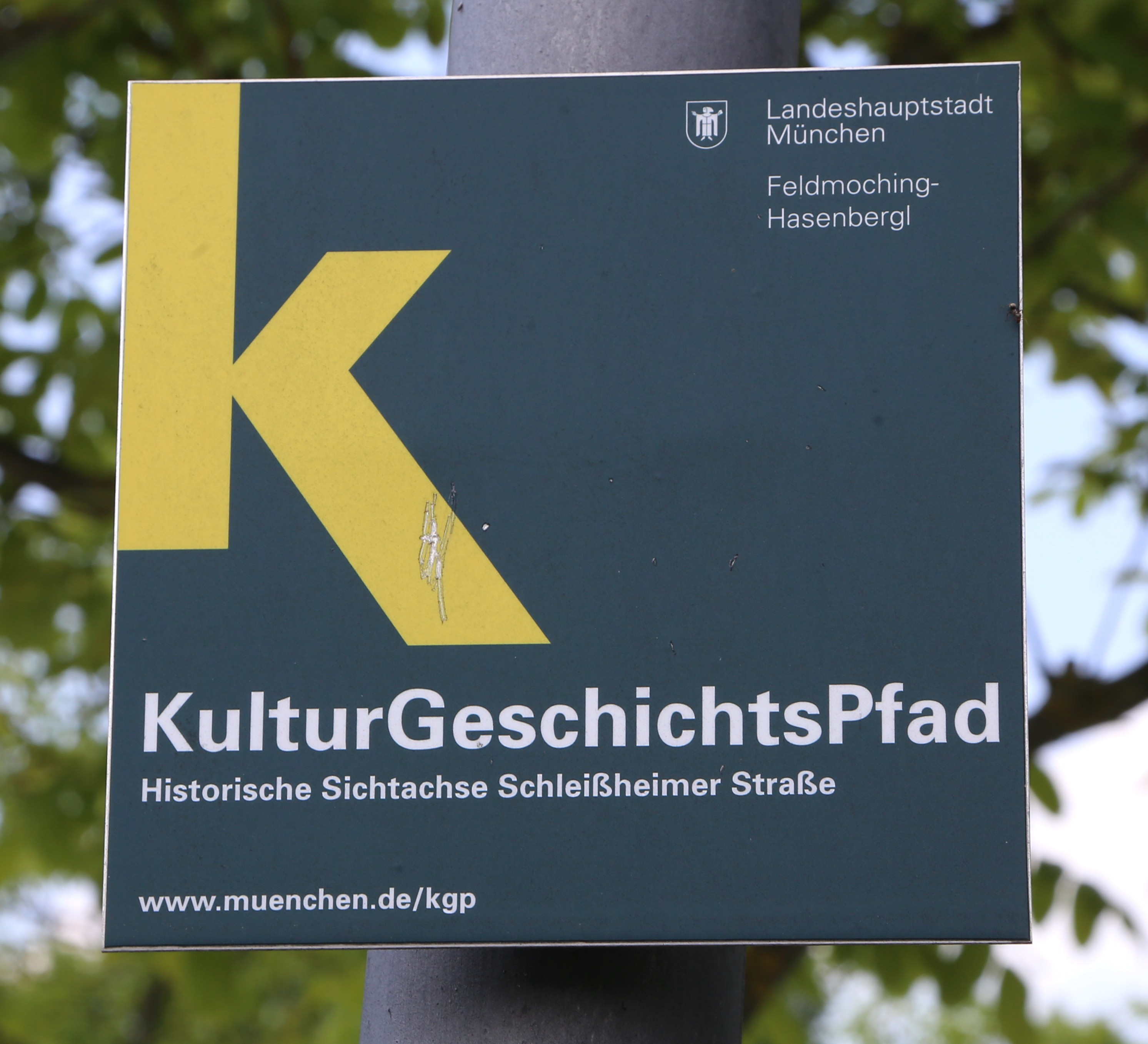 Goldschmiedplatz, Hasenbergl, München